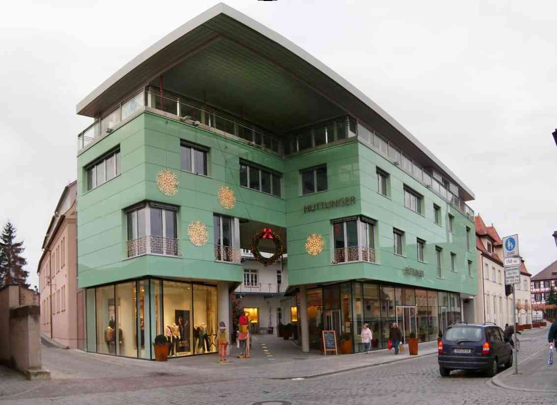 Hüttlinger Ladenzentrum, Schwabach